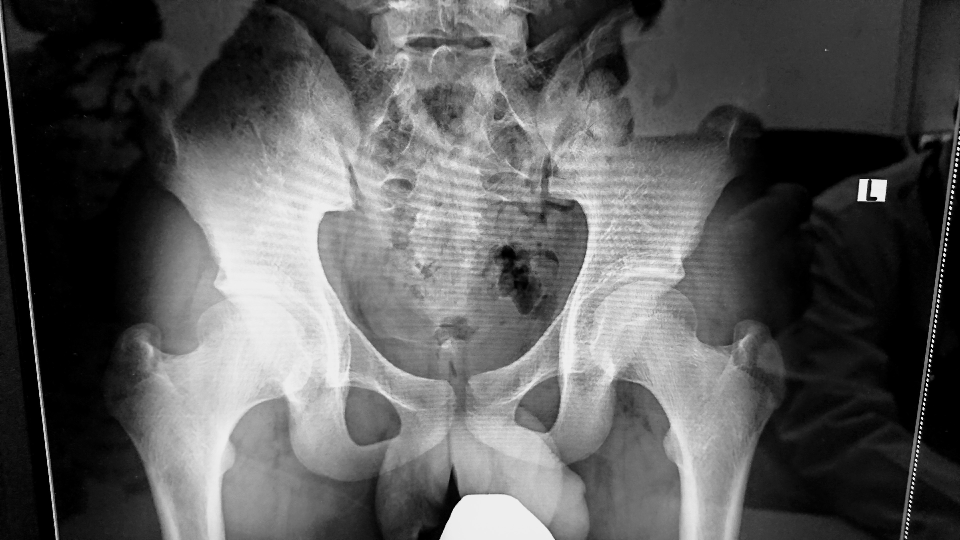 ペルテス病治癒の画像。2017年3月ごろ